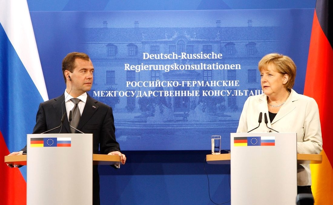 Пресс-конференция по итогам российско-германских межгосударственных консультаций. С Федеральным канцлером Германии Ангелой Меркель.